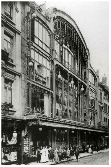 Batiment Horta. Rue Neuve à Bruxelles. Auteur inconnu, 1901